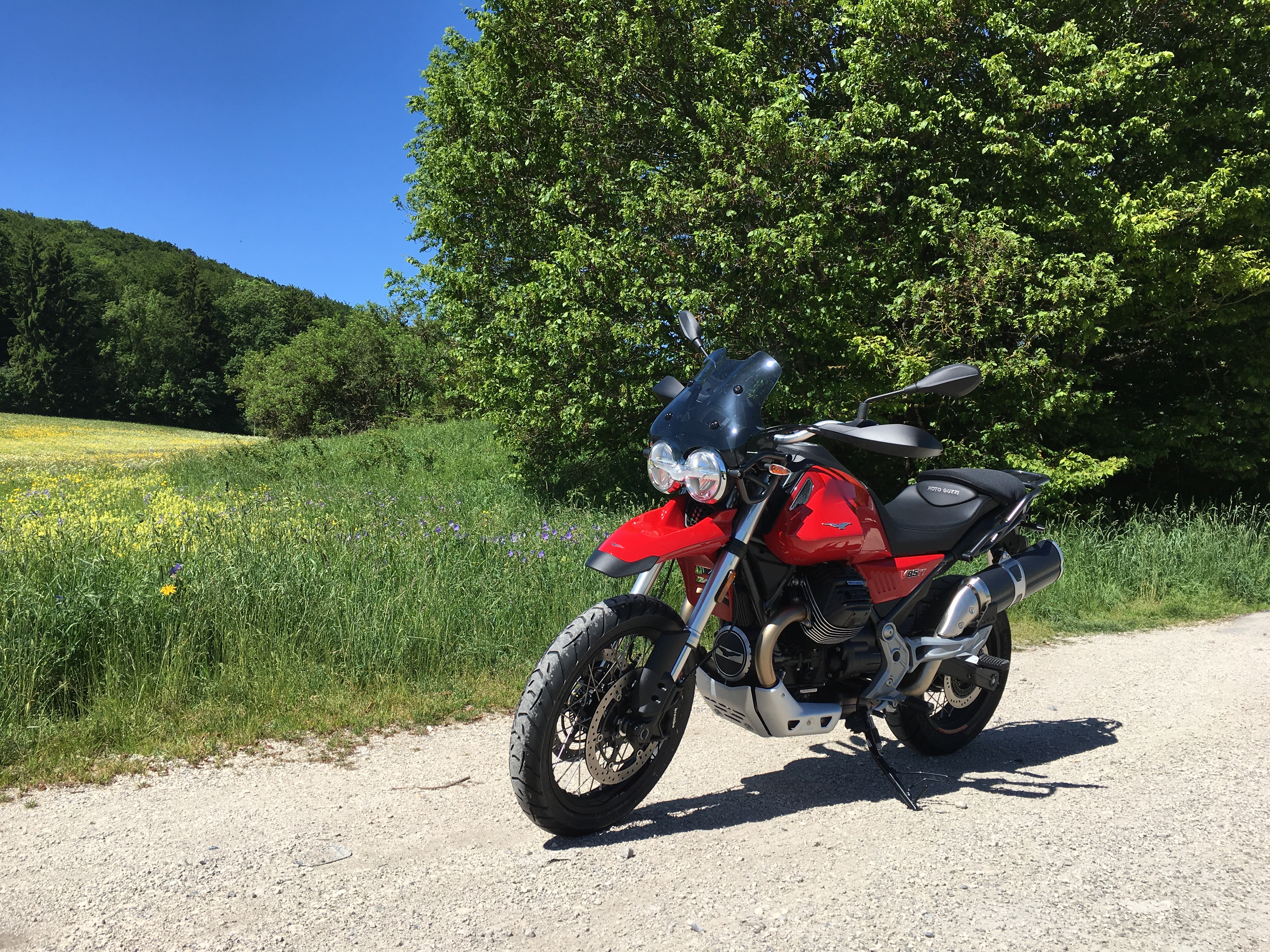 Moto Guzzi V85 TT in der Farbe "Rosso Vulcano". Sitzkissen auf dem Soziusplatz gehört nicht zum Lieferumfang.